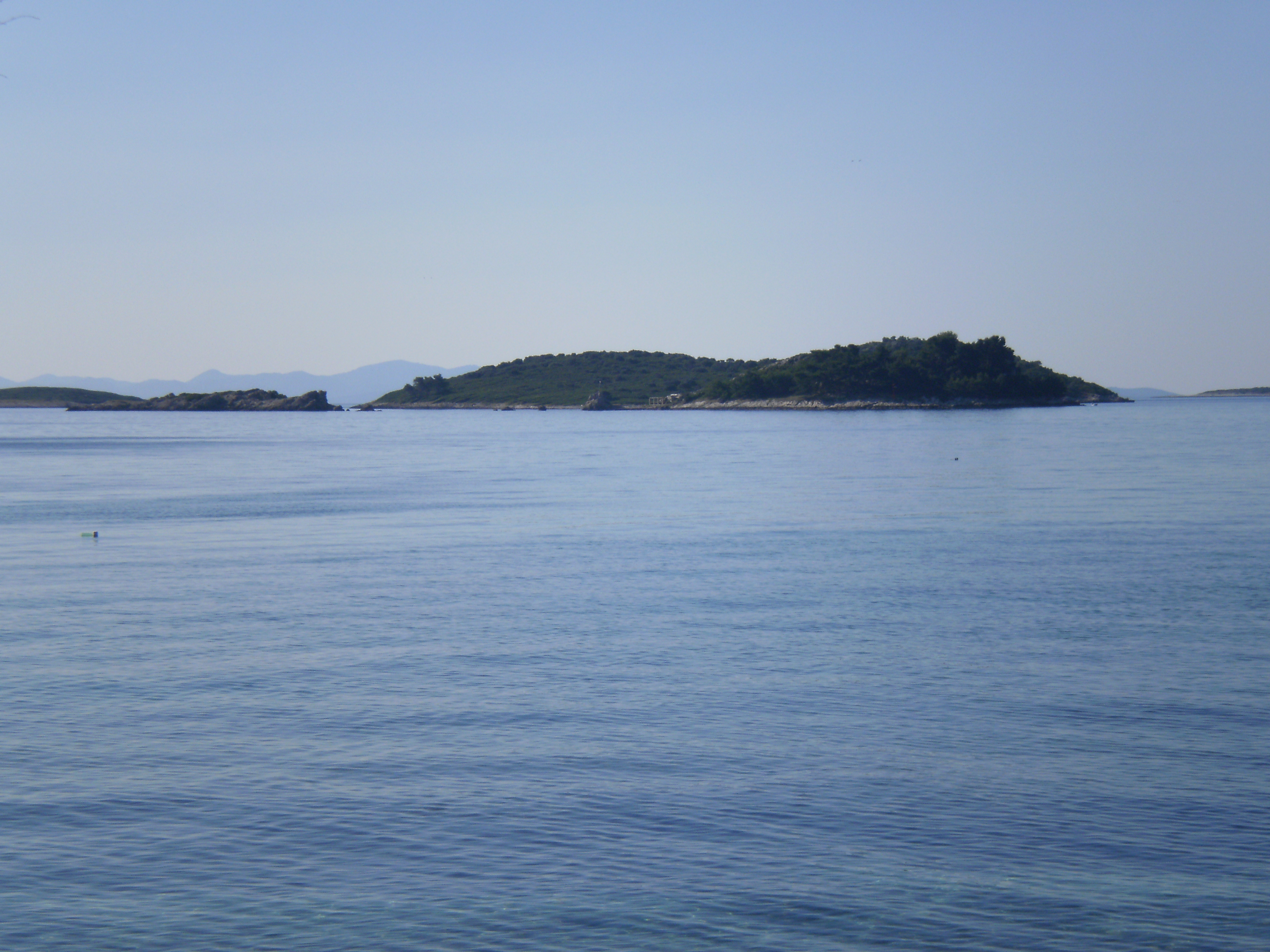 Otoci Majsanić, Stupe i Majsan